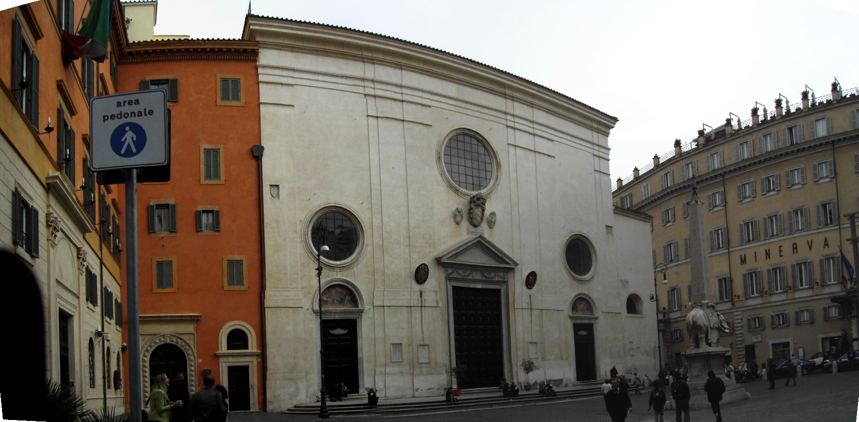 Roma, piazza della Minerva